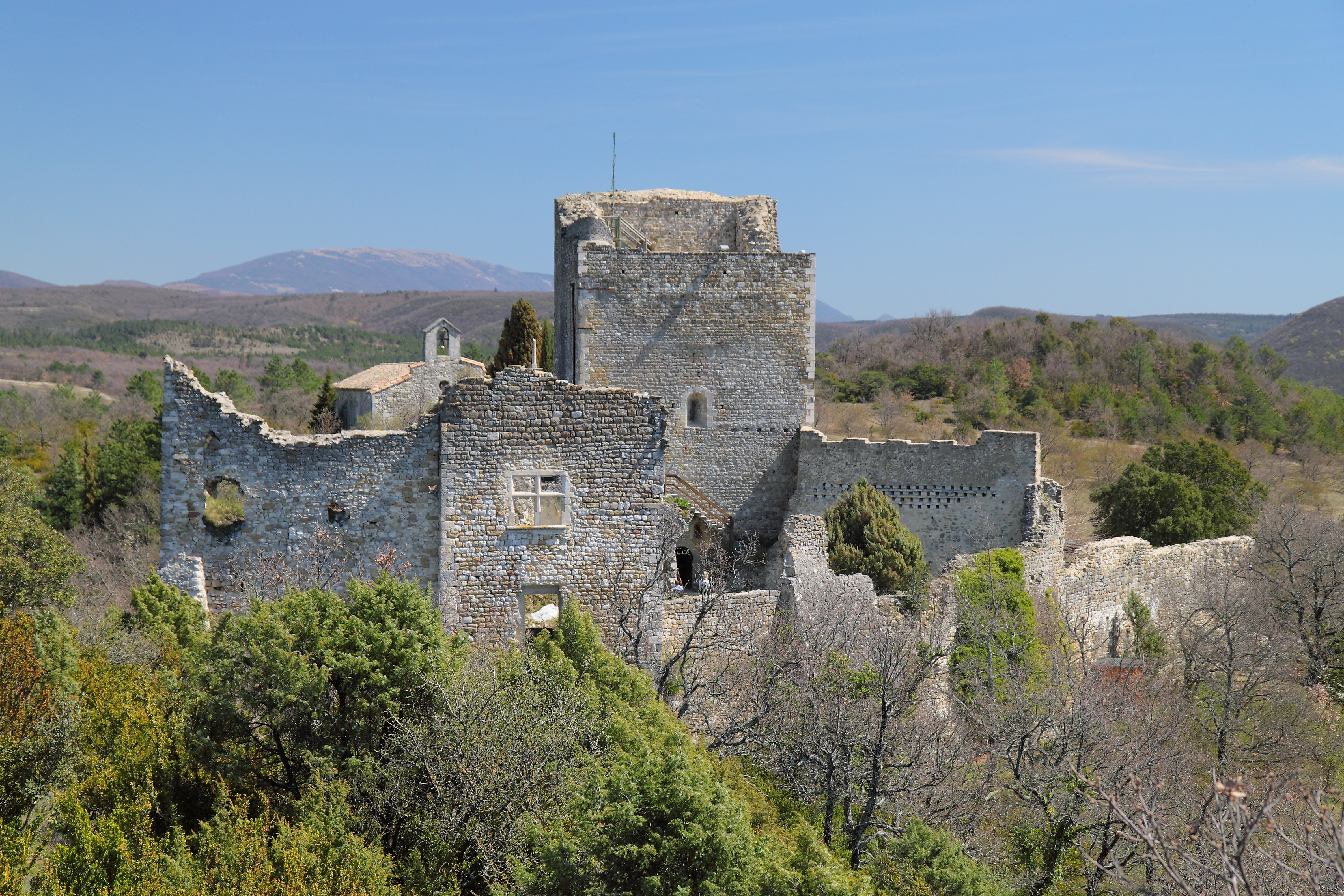 Château de Rochefort-en-Valdaine, vu depuis l'ouest